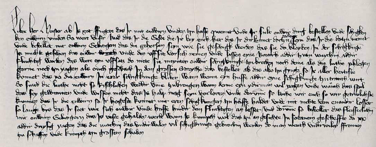 Anonymous letter concerning tactics of false retreats, employed by Teutonic Knights' enemies during The Great Battle. Written between 1411 and 1413. The text reads: "Liber her meister, ab is got ffugete, das ir mit euwirn vinden tzu hoffe qwemet, unde ir sult euwir ding bestellen unde schigken ken euwirn vinden, so were unsir ratd, das ir die geste, die ir bey euch hat, die ir dirkennet dortzu tochtig seyn, das ir die dotzu nemet, unde bestellet mit euwirn gebitigern, das die gehorsam seyn wie sie geschigk werden, das sie do bleyben in der schigkunge. Is muchte geschen, das euwir vinde den uffsatz vorsich nemen, unde lissen eyne banirh addir tzwu weychin addir fluchtig werden: das were eyn uffsatz do mete sie meynten euwir schigkunge tzubrechen, noch deme als die luthe phlegen gerne noch tzu yagen, als ouch geschach in dem grossen streythe. Das bestellet, ab das alzo tzu gynge, so ir aller hertiste kunnet, das yo die euwirn in erer schigkunge bliben: wann wenne eyn huffe addir eyne schigkunge tzutrauth wirt, so sintd die Iwthe nicht so rischlichen weddir umbe tzubrengen, wann denne eyn ydirman will yagen, unde waenth, das spil das sey gewunnen unde wissen nicht, das is halp mag seyn vorloren. Unde dorumbe so rothe wir euch, so wir getrwlichste kunnen, das ir die euwirn, so ir hogeste kunnet, mit eren schigkungen tzu haeffe haldet unde mit nichte von enandir losset, so lange bys das ir seet, wie sich euwir vinde huffe hindir dem fluchtigen an lesset. Unde dorumbe so bestellet das fleisseclichen mit euwirn gebitigern, das is veste gehalden werde, wann is kumpth wol das tzu angesichte in sotanem gescheffte, do XX addir dreysig yagen, das die machin, das undirwilen vil schigkunge gebrochin werden, do man wenth undirwilen ffromen tzu schaffen unde kumpth tzu grossem schaden."